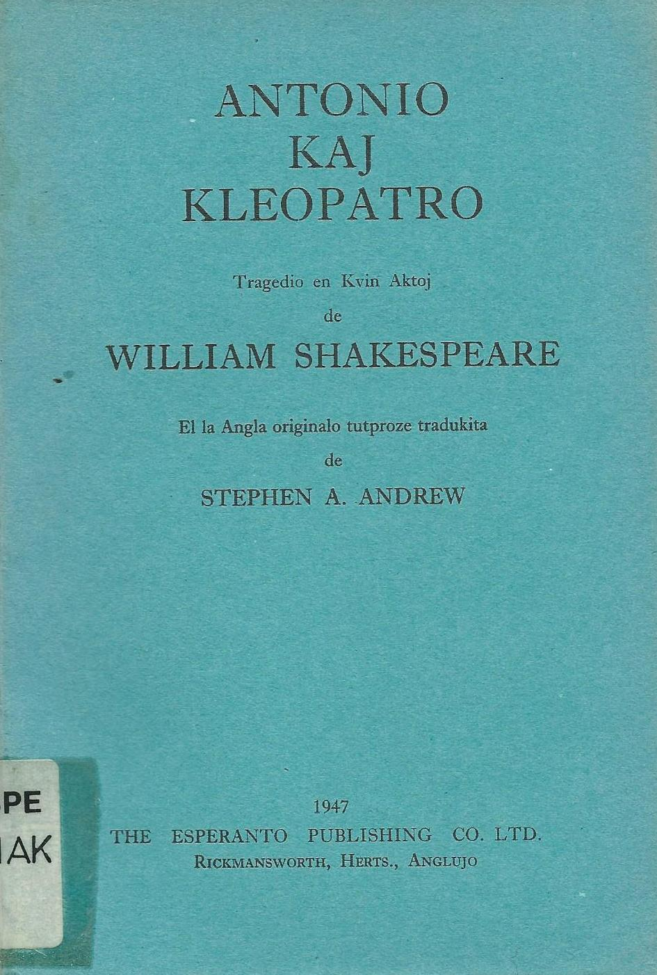 librokovrilo de "Antonio kaj Kleopatro", 1947